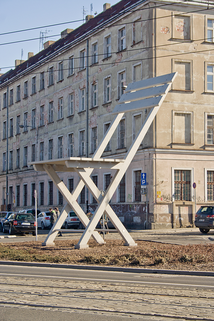 Rzeźba "Krzesło" przy ul. Rzeźniczej we Wrocławiu